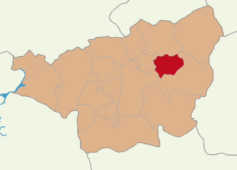 Hazro ilçesinin konumu